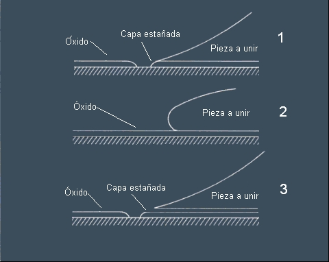 Diferentes calidades de soldadura blanda